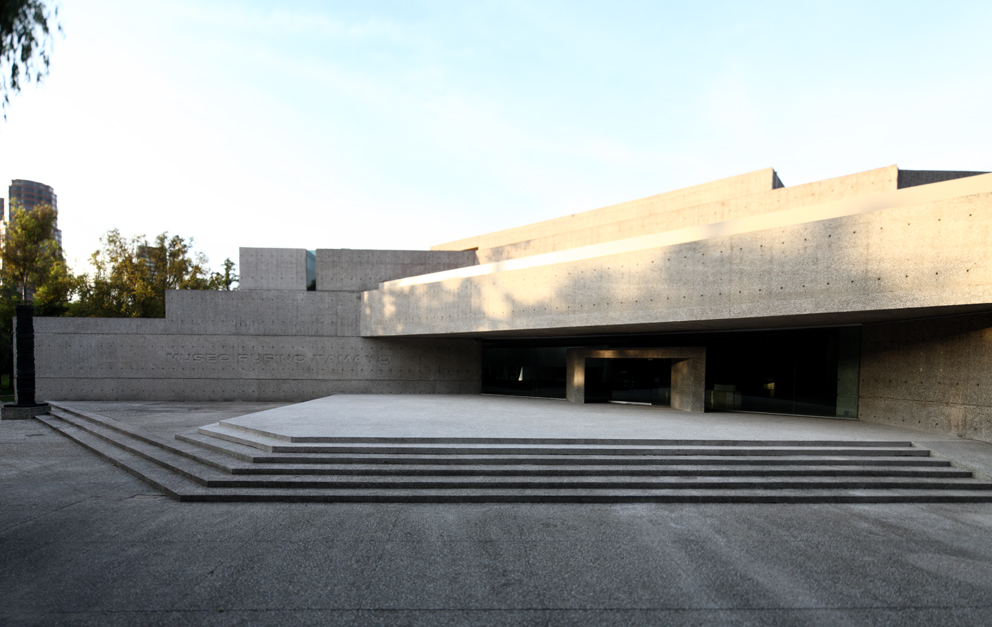 El Museo Tamayo es uno de los museos de arte contemporáneo más destacados de Latinoamérica.